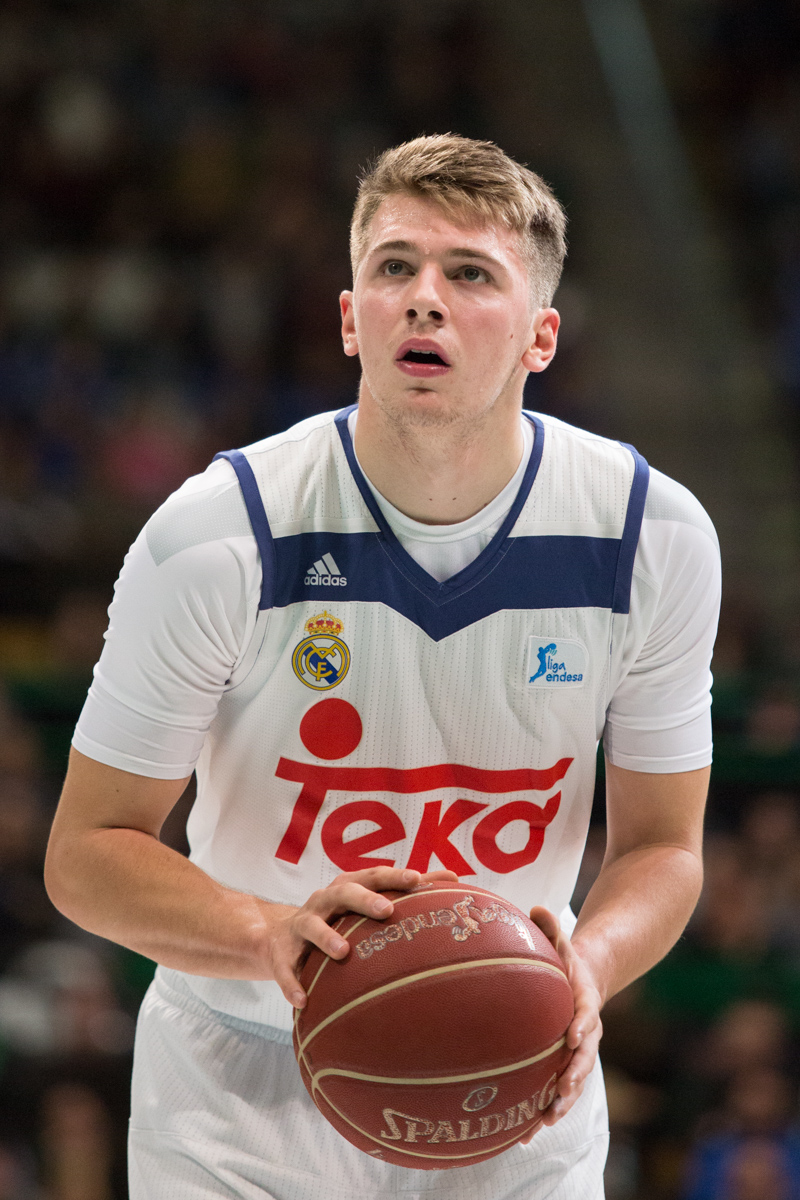 Luka Dončić amb la samarreta del Reial Madrid en un partit a l'Olímpic de Badalona durant la temporada 2016-17.